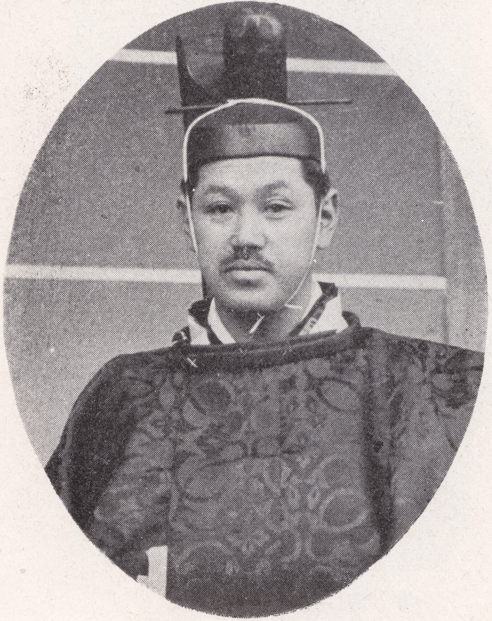 大礼使典儀官・子爵清岡長言